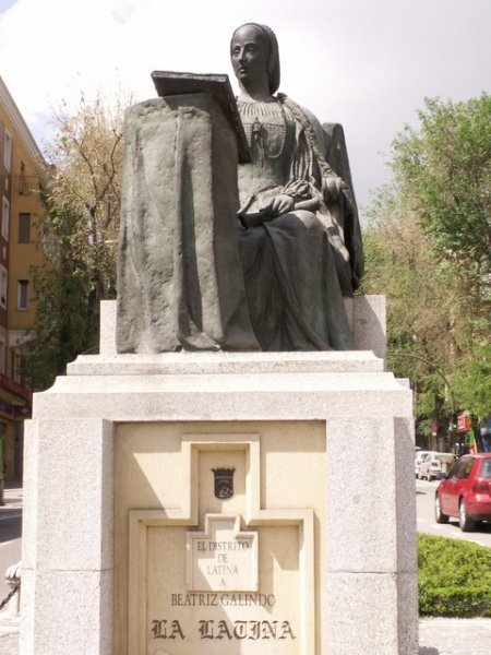 Monumento a Betriz Galindo "La Latina" en el Paseo de Extremadura de Madrid (España) a la altura de la plaza de la Puerta del Angel.